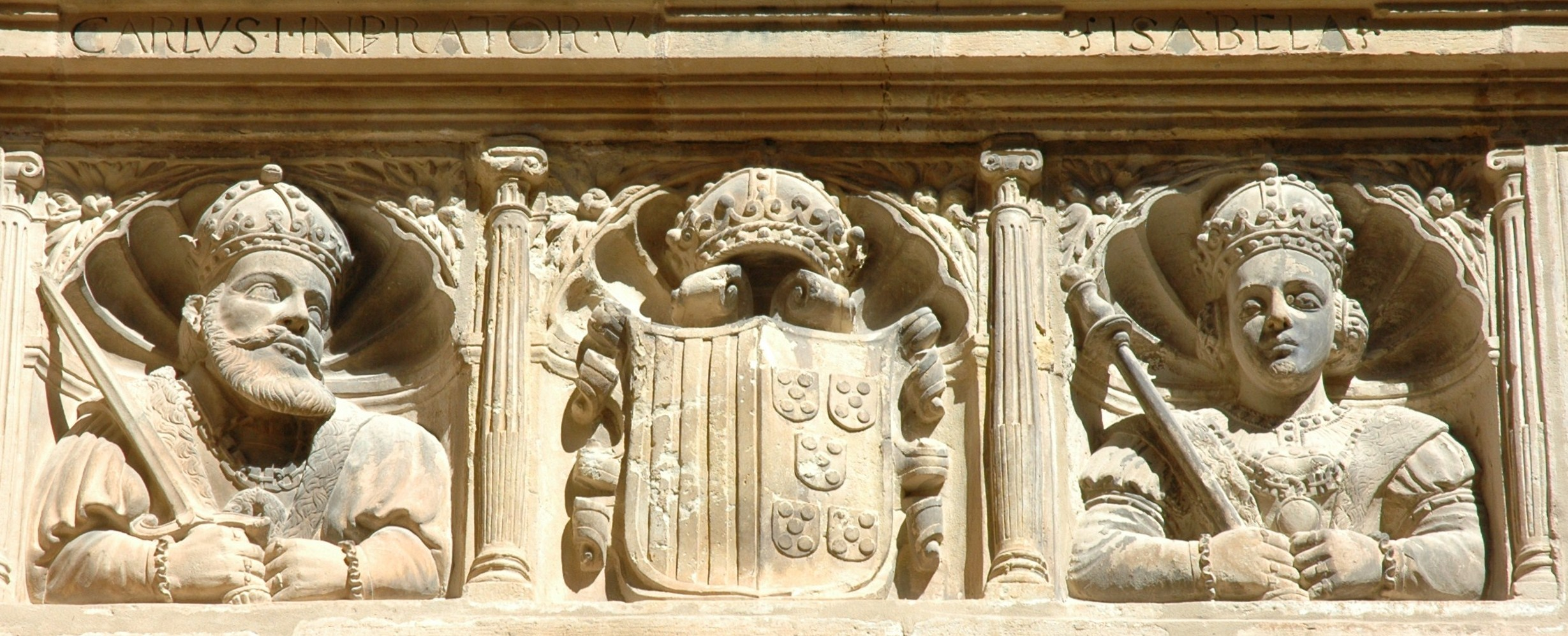 Carles V del Sacre Imperi Romanogermànic i Isabel de Portugal i d'Aragó als Reials Col·legis de Tortosa